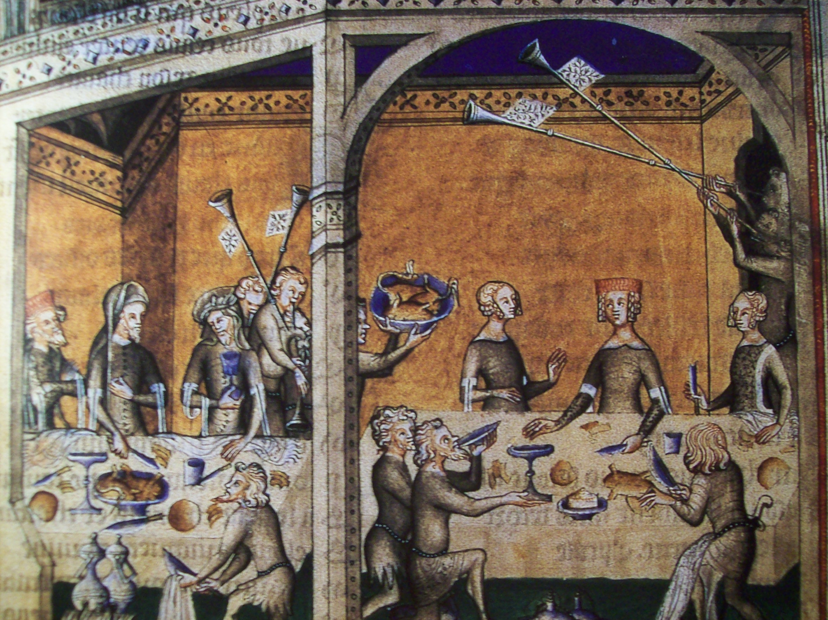 Miniatur zu „Poésis“ des Guillaume de Machart 1586